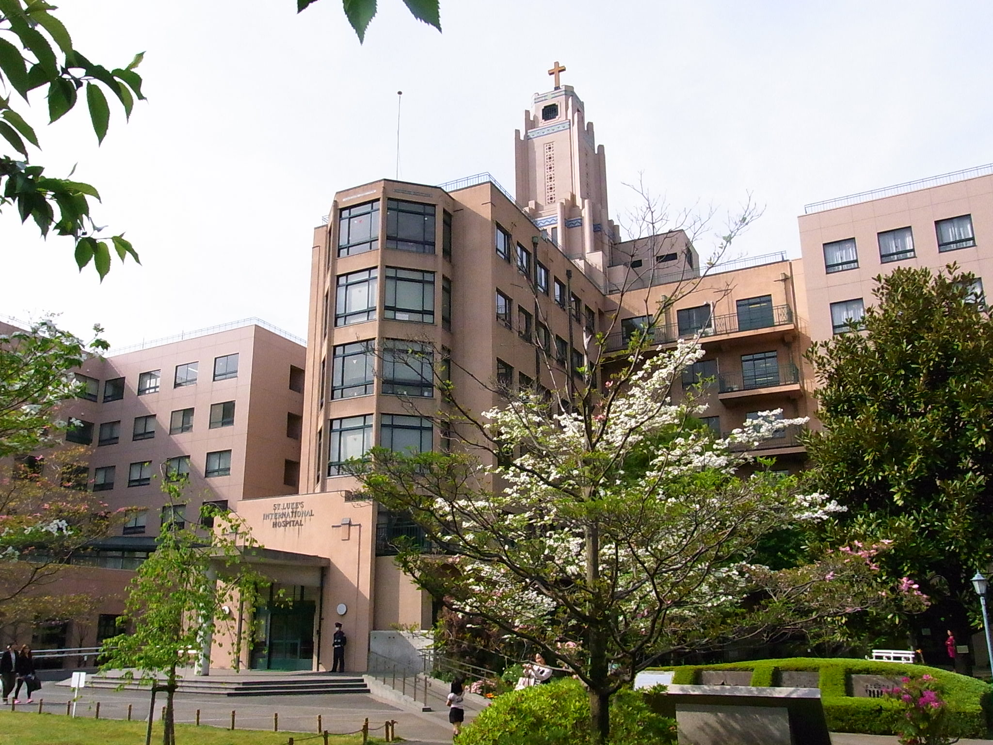 聖路加国際病院